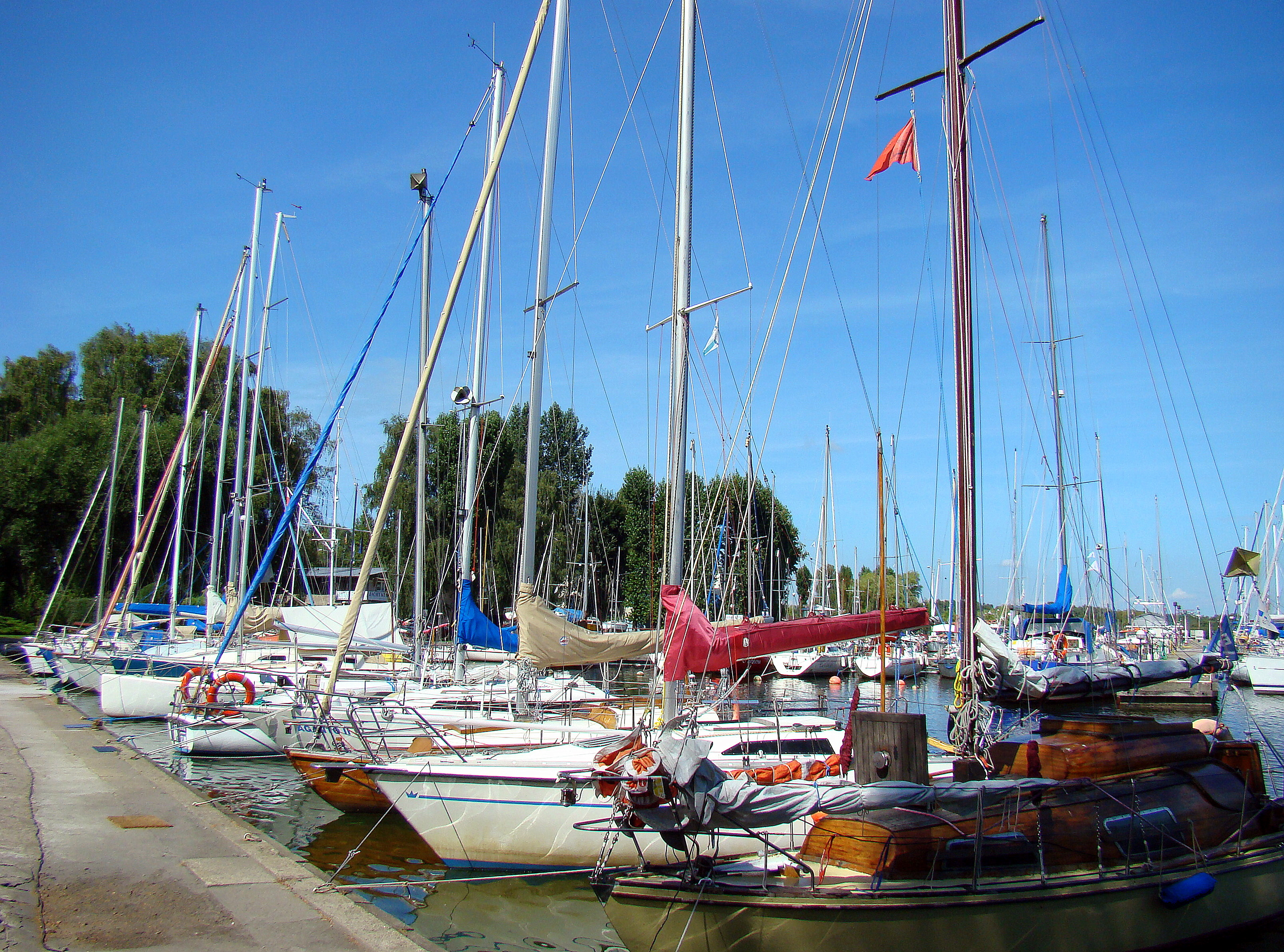 Jacht Klub AZS, Szczecin, Polska